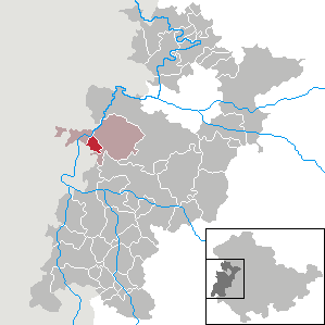 Dippach in Thuringia - Wartburgkreis